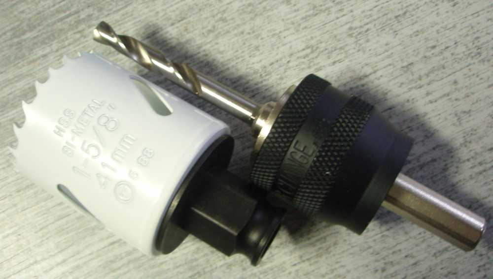 Bi-metal hole saw 41 mm diameter